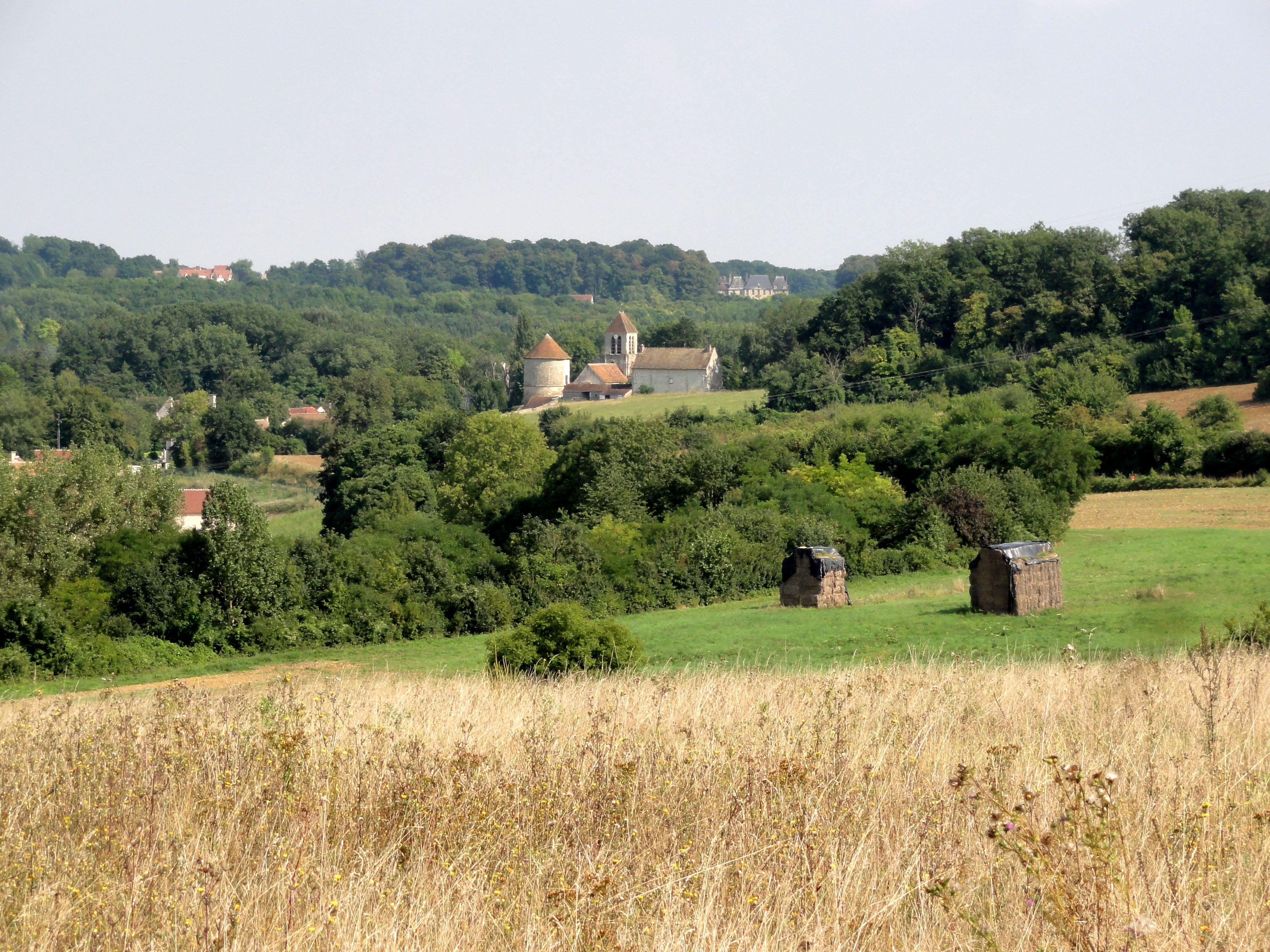 Vue sur le village depuis le sud-ouest.